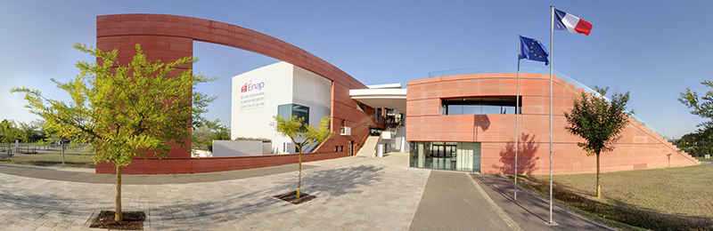 Vue panoramique de l'école